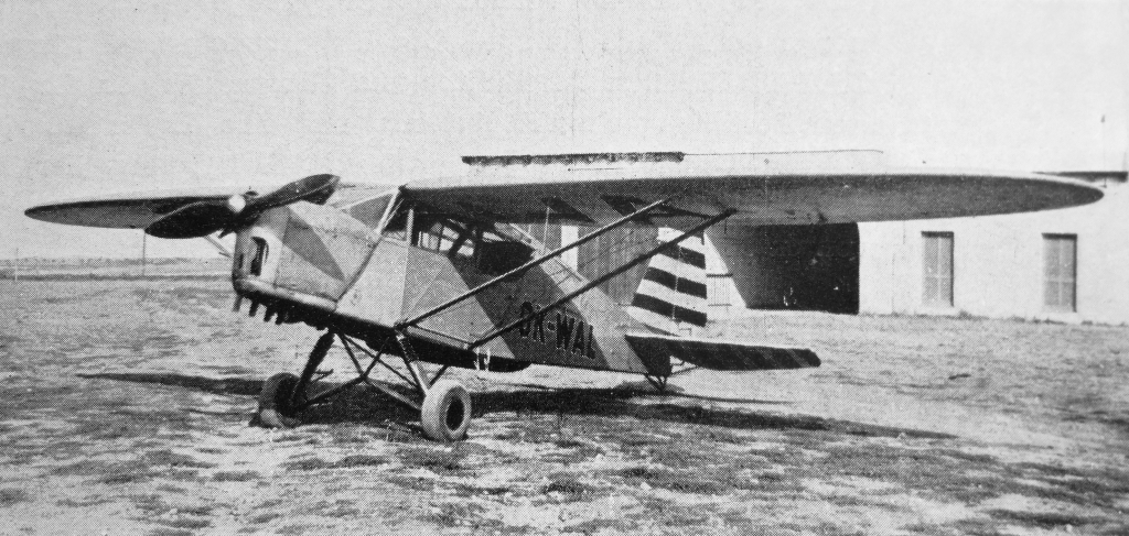 letecký motor Walter Junior 4 a letoun Breda 15-S